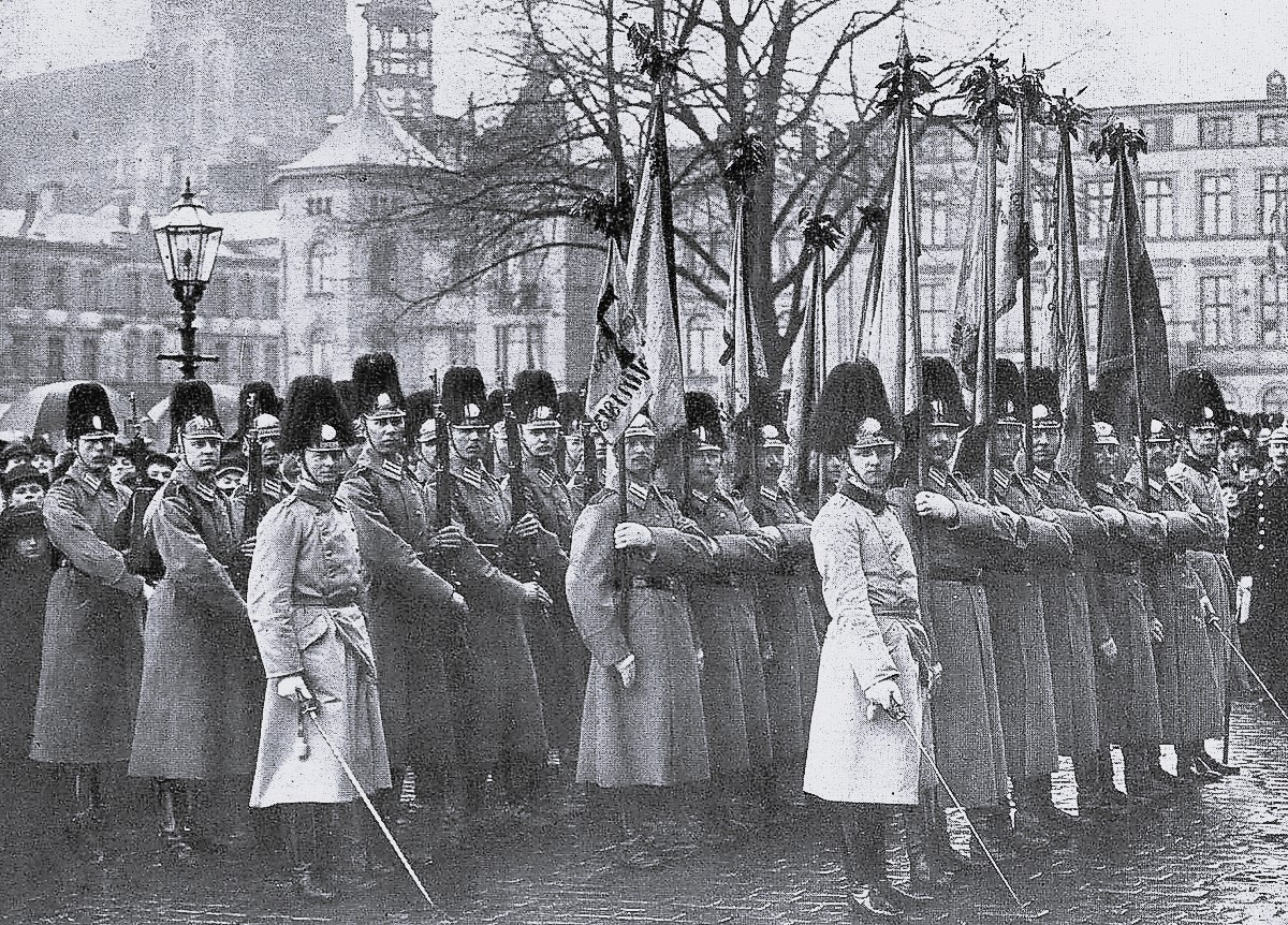 Fahnenkompanie des Grenadierregiments Nr. 89, angetreten anlässlich der 100-Jahr-Feier des Befreiungskrieges vor dem Arsenal Schwerin am 10. März 1913.